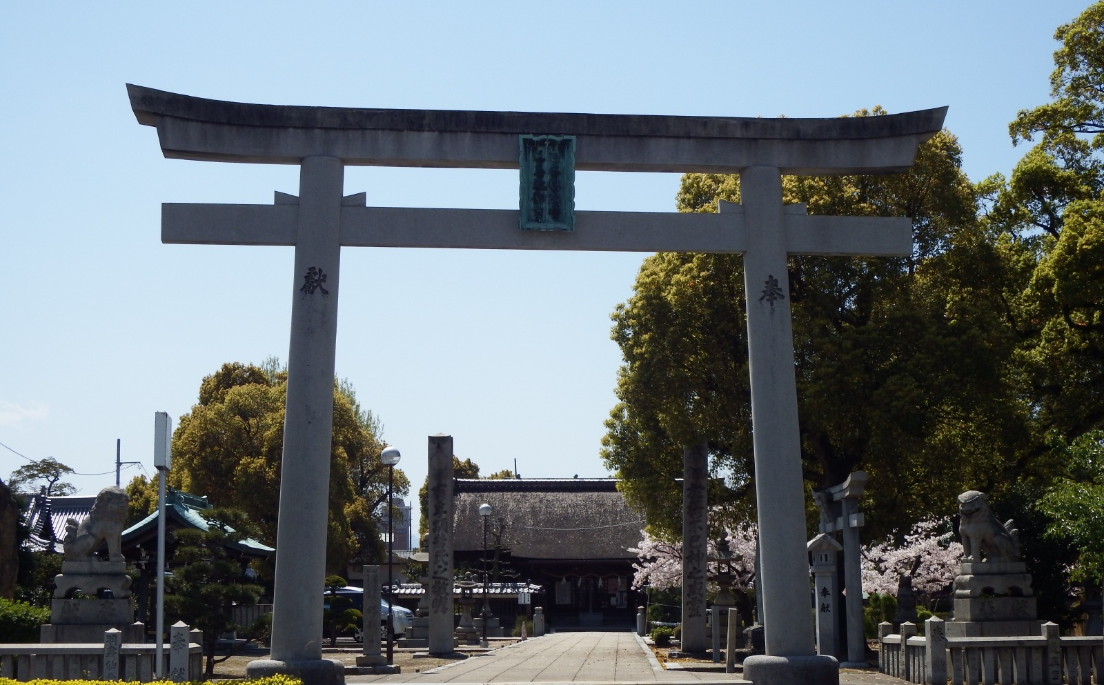 別宮大山積神社